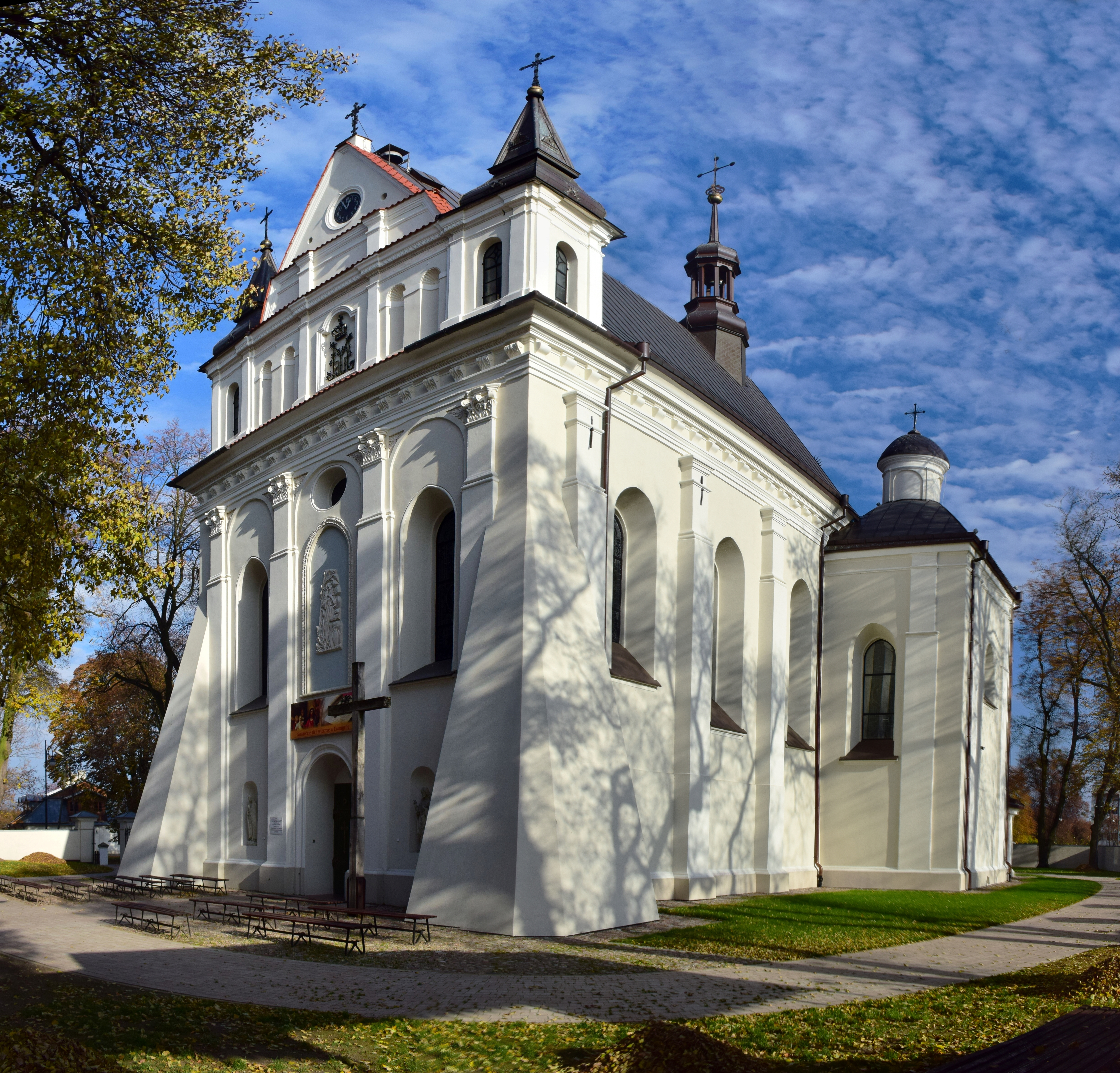 Kościół - siedziba parafii św. Marii Magdaleny w Łęcznej, woj. lubelskie.